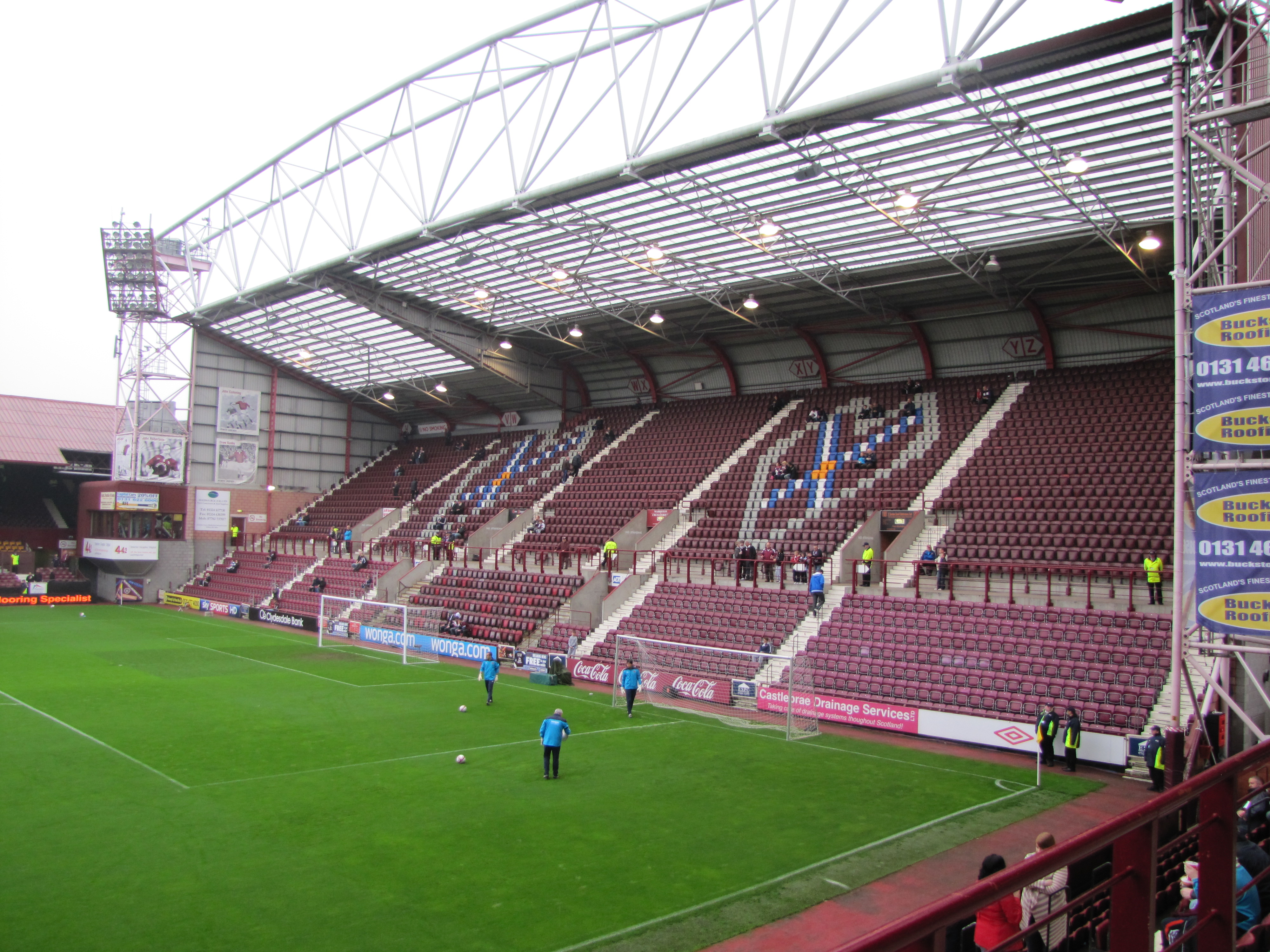 Gorgie Stand (vanaf Wheatfield Stand)